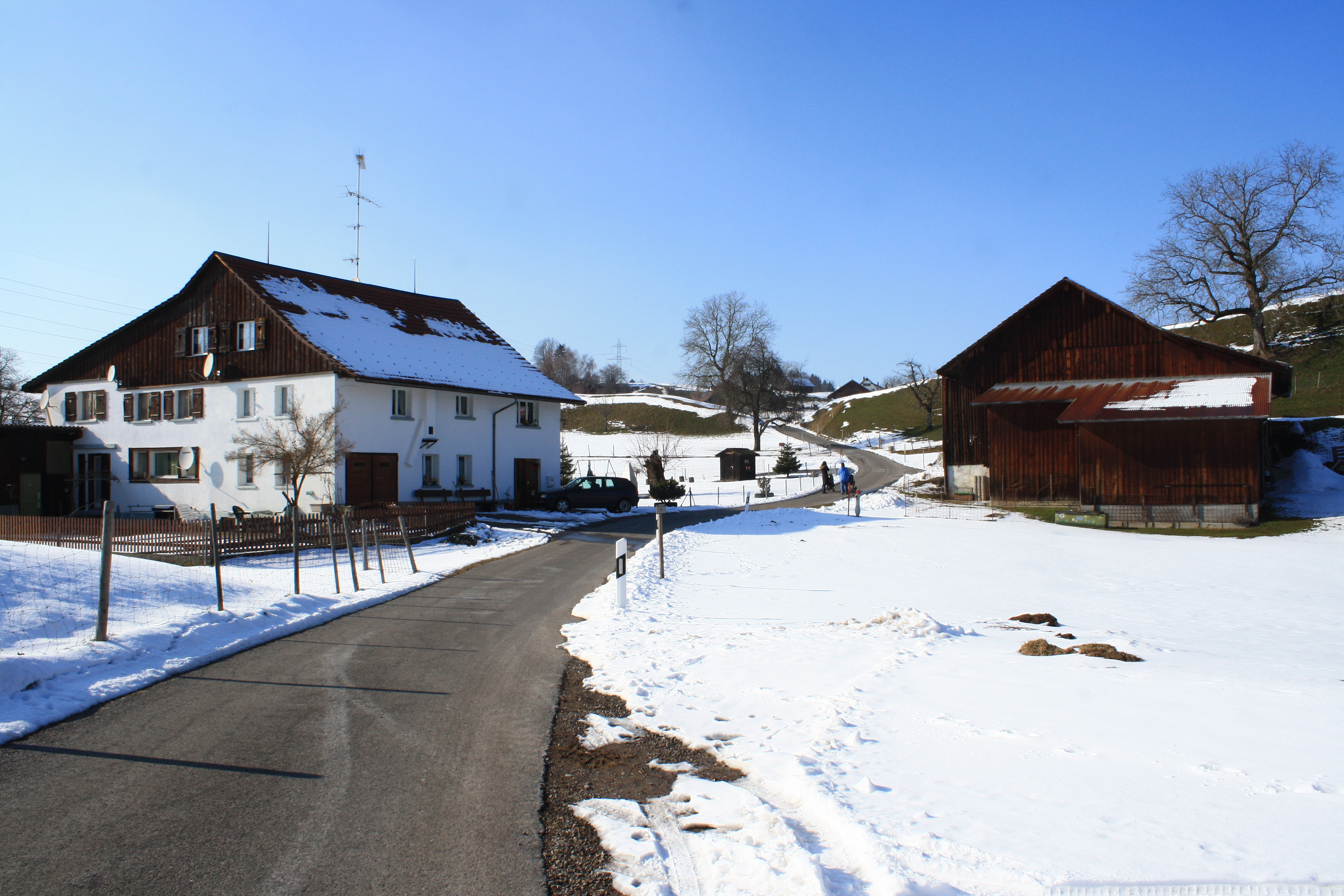 Neuguet, Güntisbergstr., Wald ZH (Switzerland). 47.2584 N, 8.9143 E.